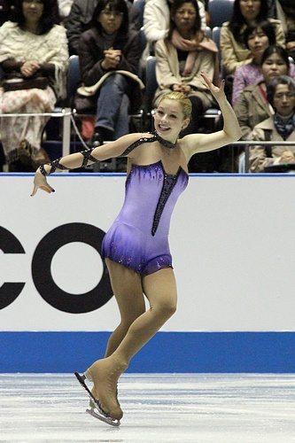 Грейси Голд (США) на командном чемпионате мира по фигурному катанию 2012